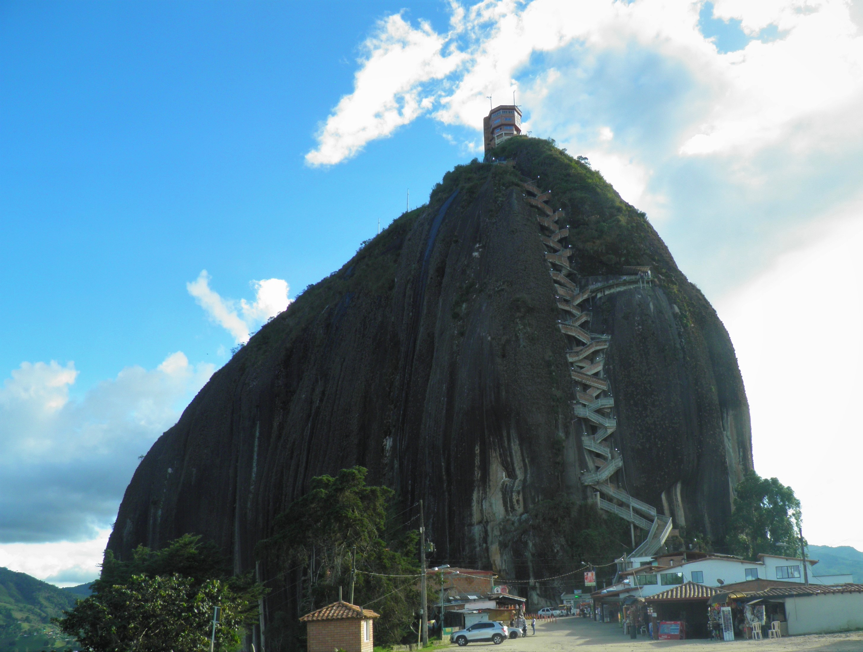 El Peñón de Guatapé 2014 v listopadu 2014